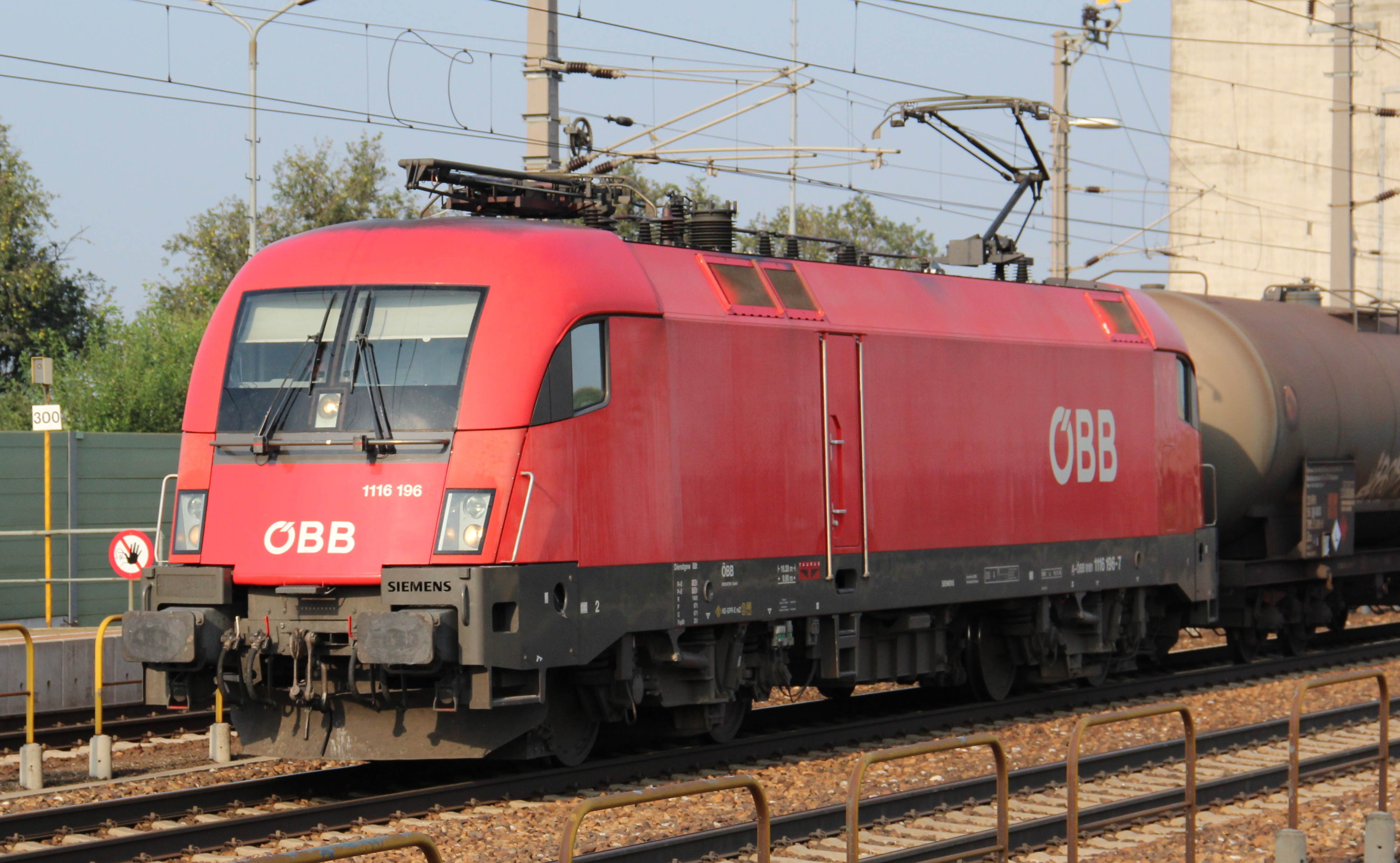 Detailaufnahme der ÖBB 1116.196, die gerade einen Güterzug durch Prinzersdorf zieht.